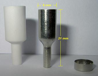 Verschiedene Tiegel zur Analyse. Von links nach rechts: DTA-Tiegel aus Aluminiumoxid, DTA-Tiegel aus Platin-Iridium, DSC-Tiegel aus Platin-Iridium.